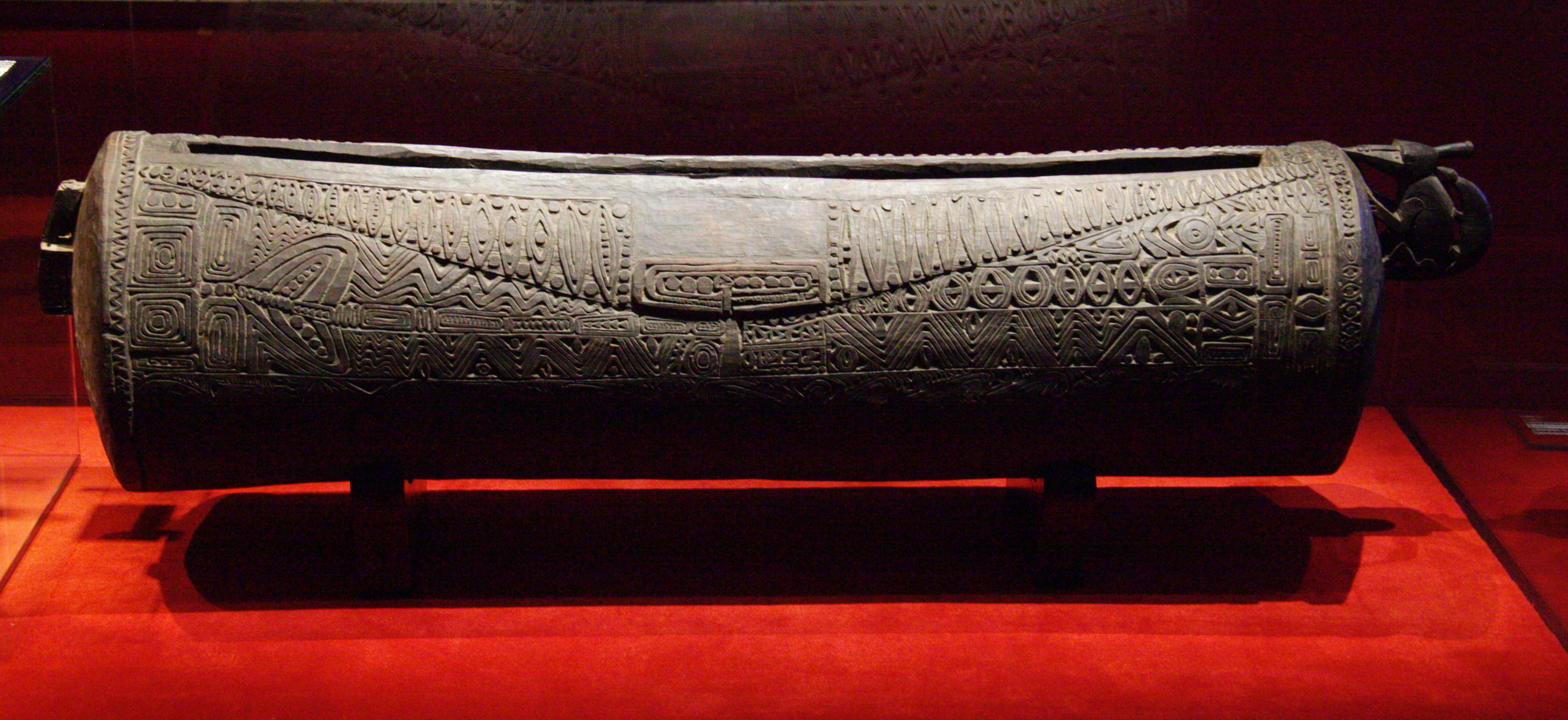 Instruments al Museu de la Música de Barcelona. Fotografies fetes durant el Backstage pass, el 21-11-2013